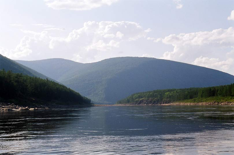 Витим после Бамбуйки